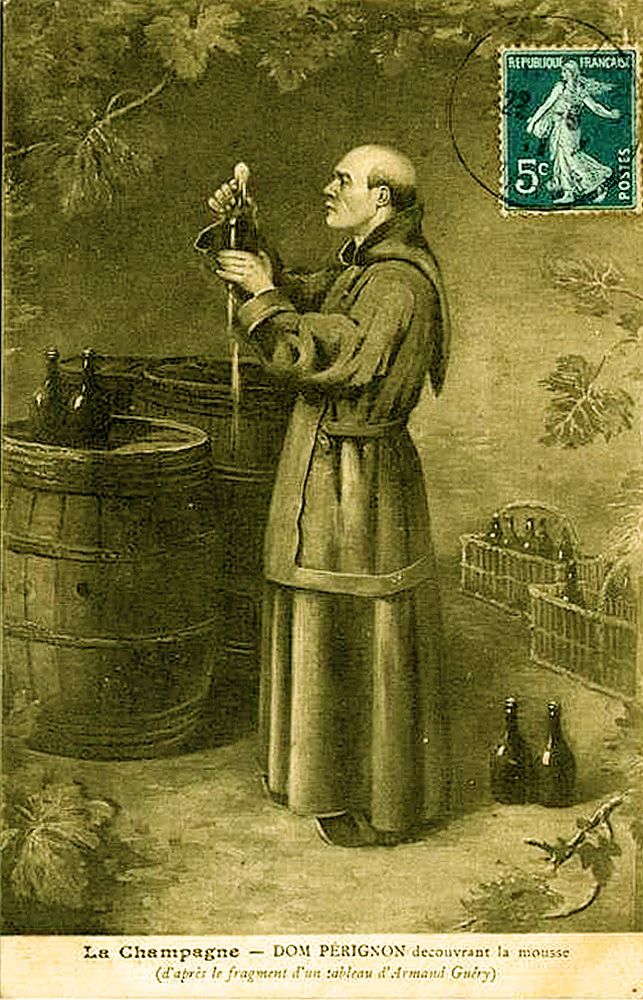 Dom Pérignon découvrant la prise de mousse